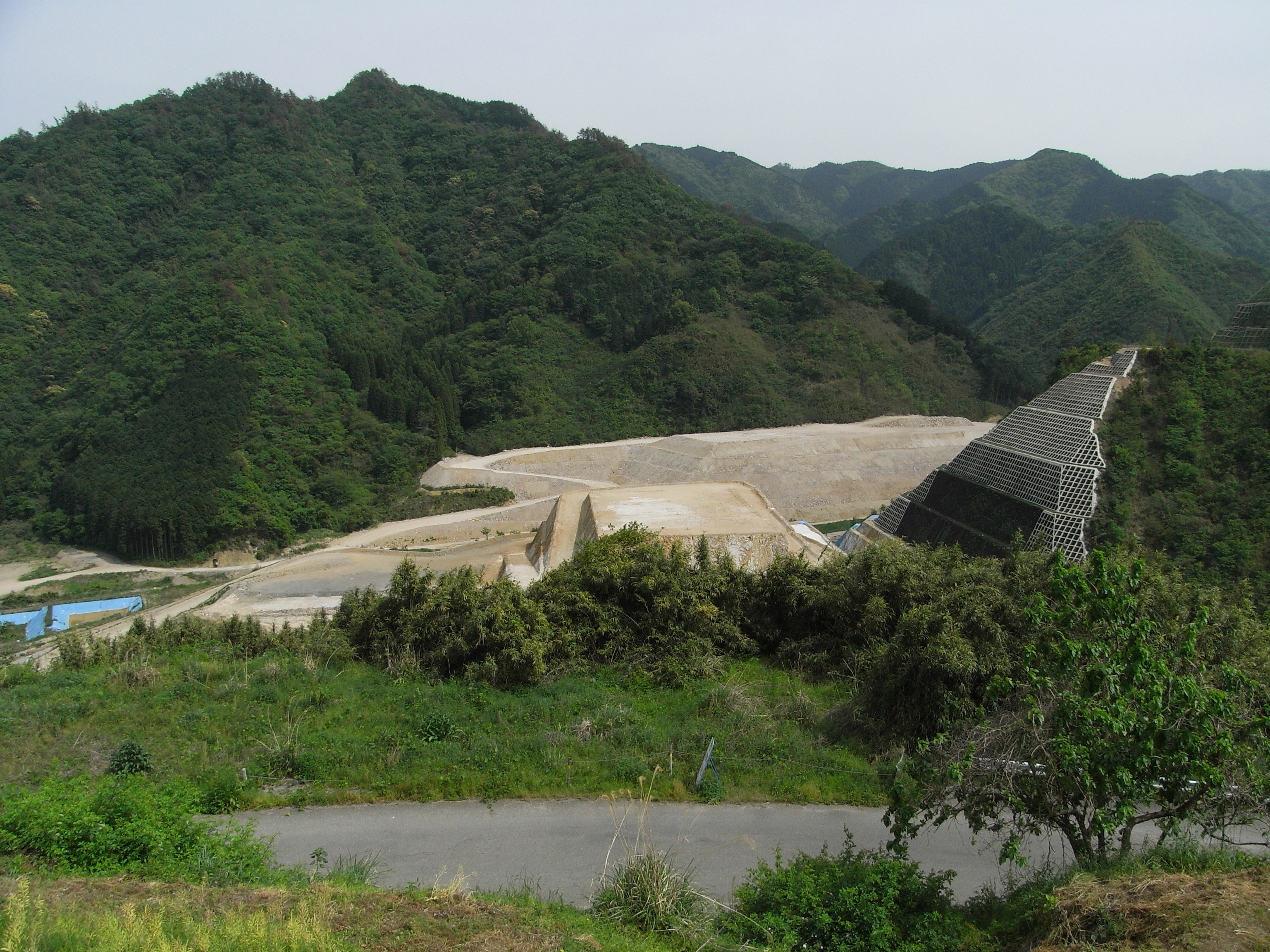 Dam